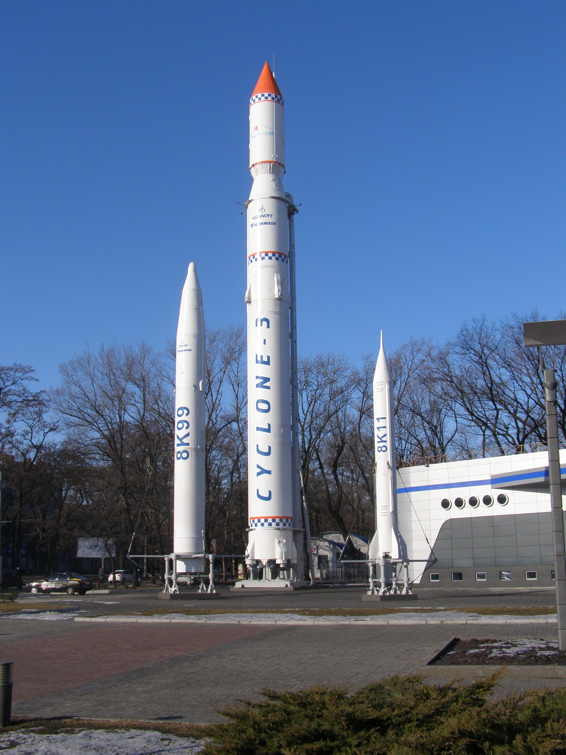 Центр інноваційних технологій «Парк ракет» в Дніпропетровську. Макети ракет «Циклон-3», 8К99, 8К11.